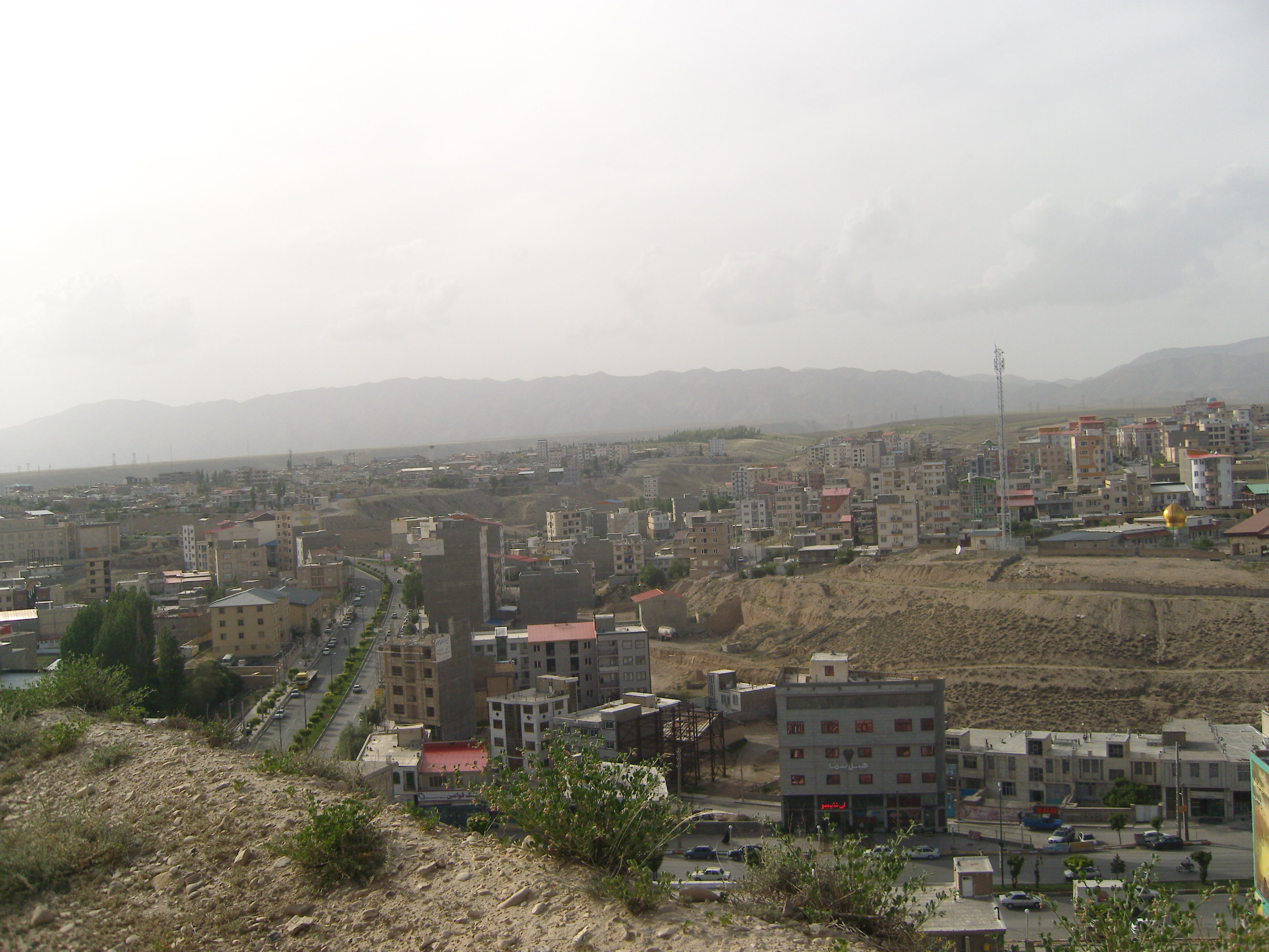 نمائی از شهر فیروزکوه از بلندی های مفت آباد